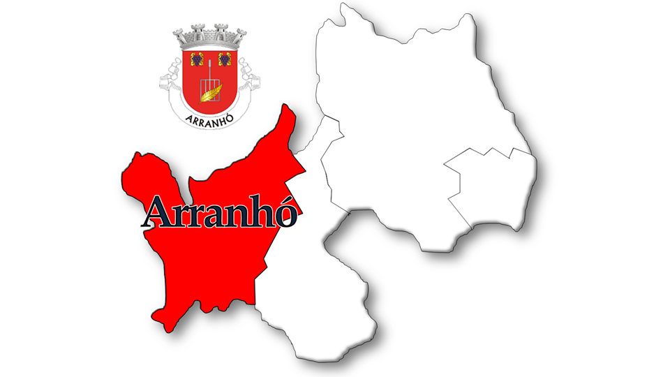 Evolução da População